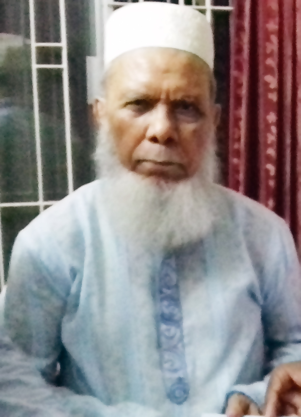 প্রফেসর মোহাম্মদ আব্দুল্লাহ